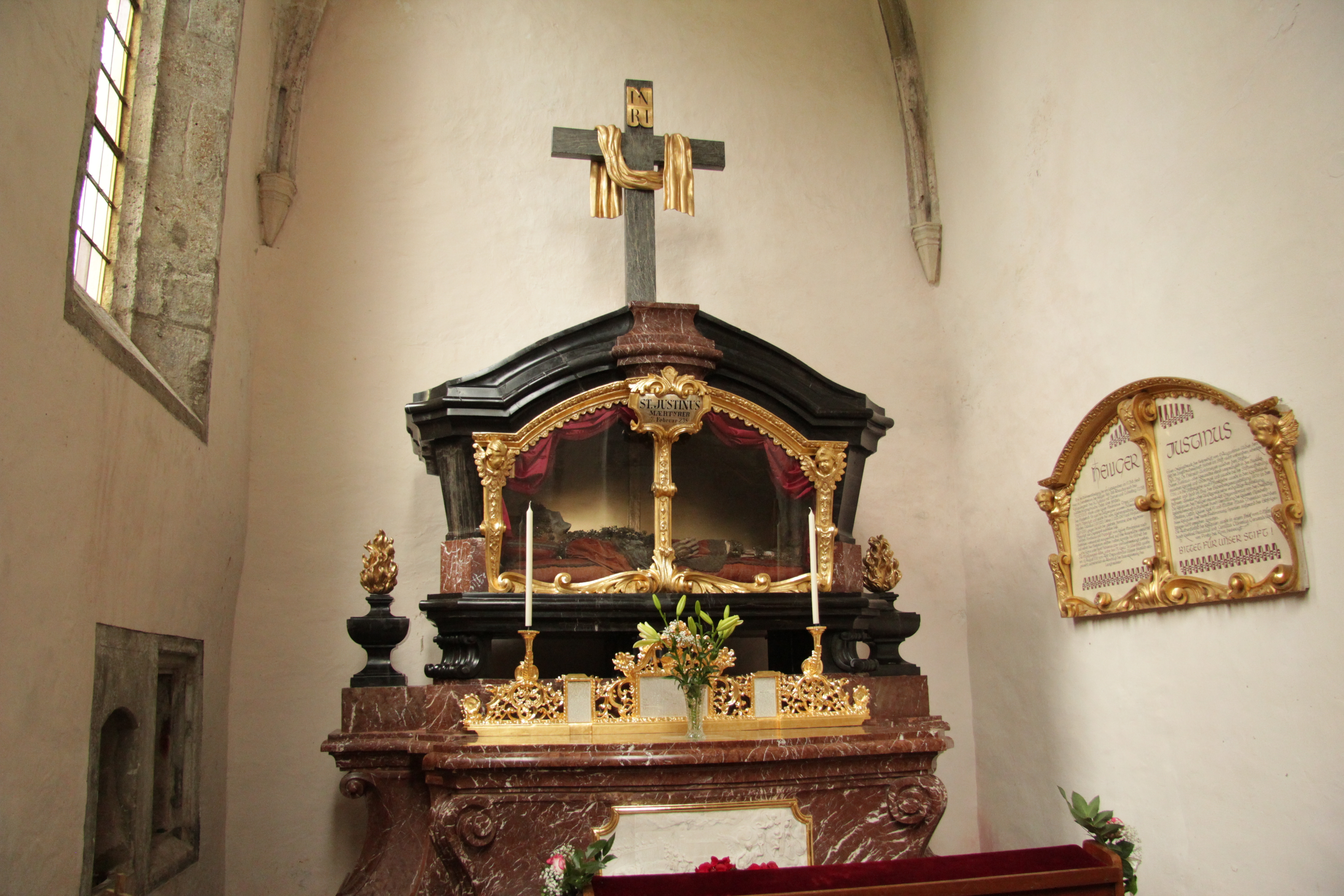 Reliquienschrein des hl. Justinus dem Märtyrer im Stift Lilienfeld, Niederösterreich